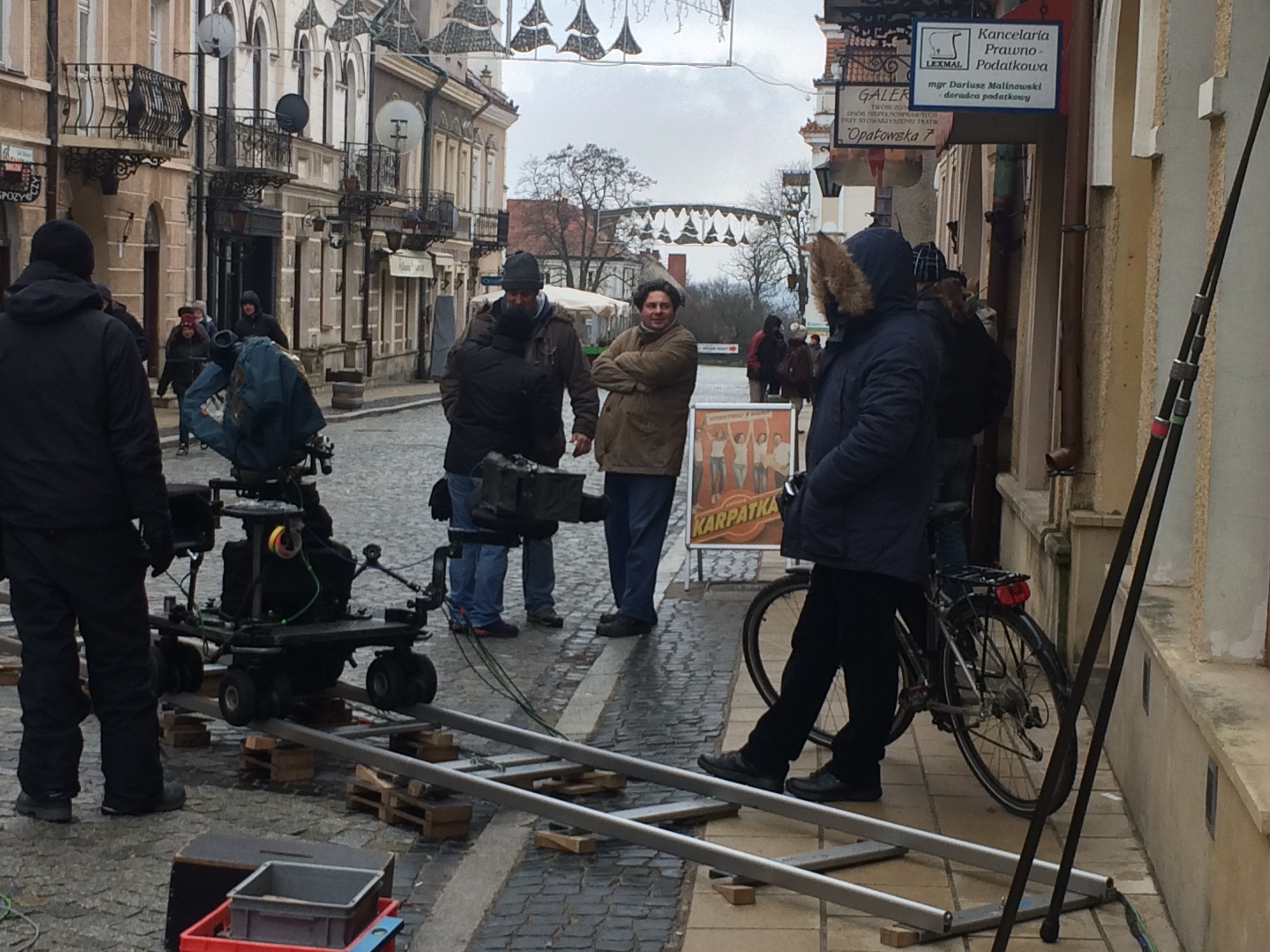 Plan zdjęciowy serialu "Ojciec Mateusz" w Sandomierzu.